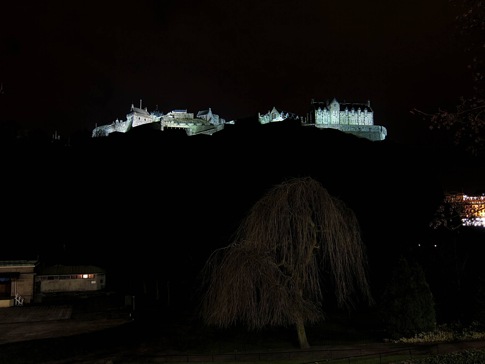 Le château d'Edimbourg (Ecosse).